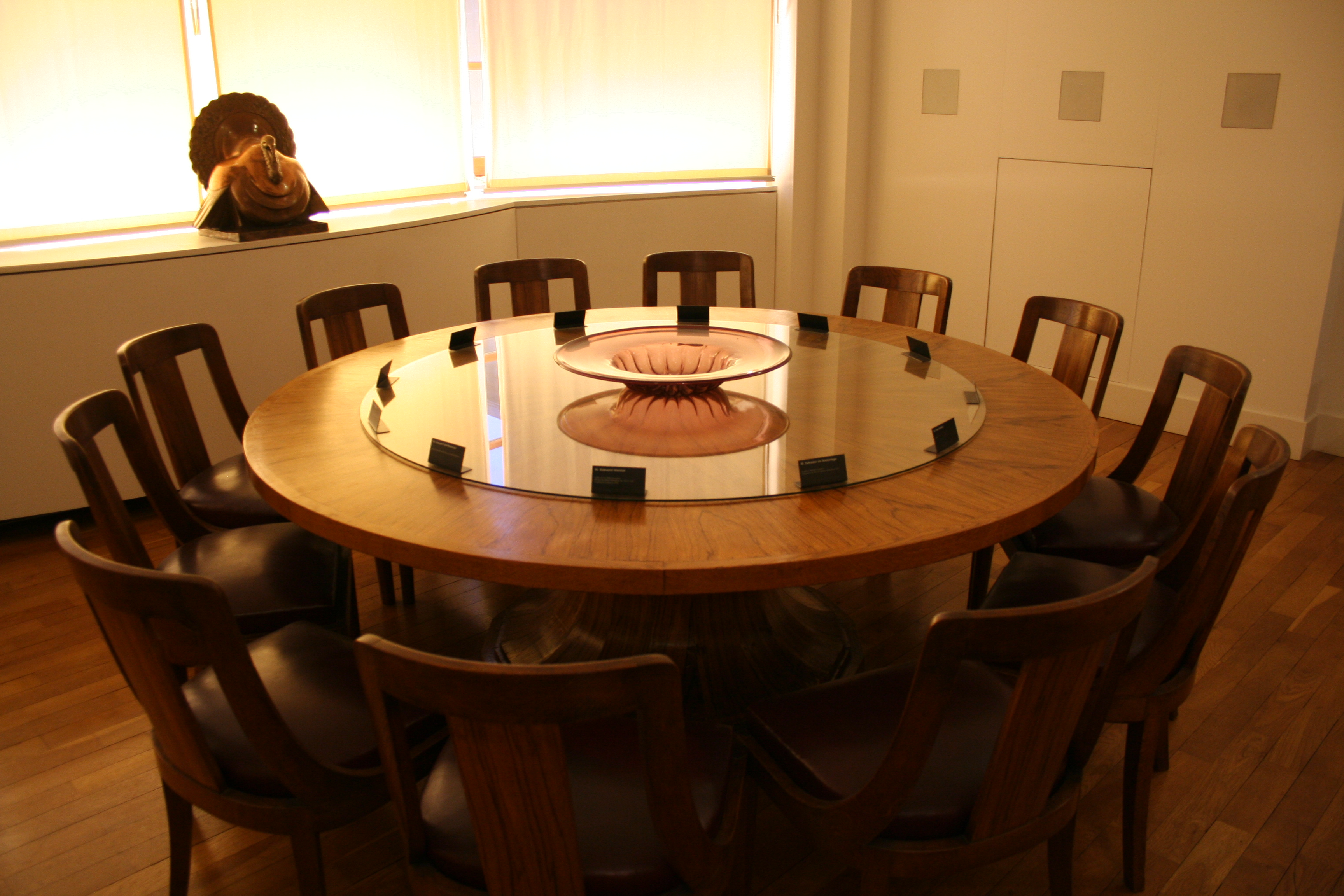 Salon de Louise Weiss reconstitué au musée de Saverne